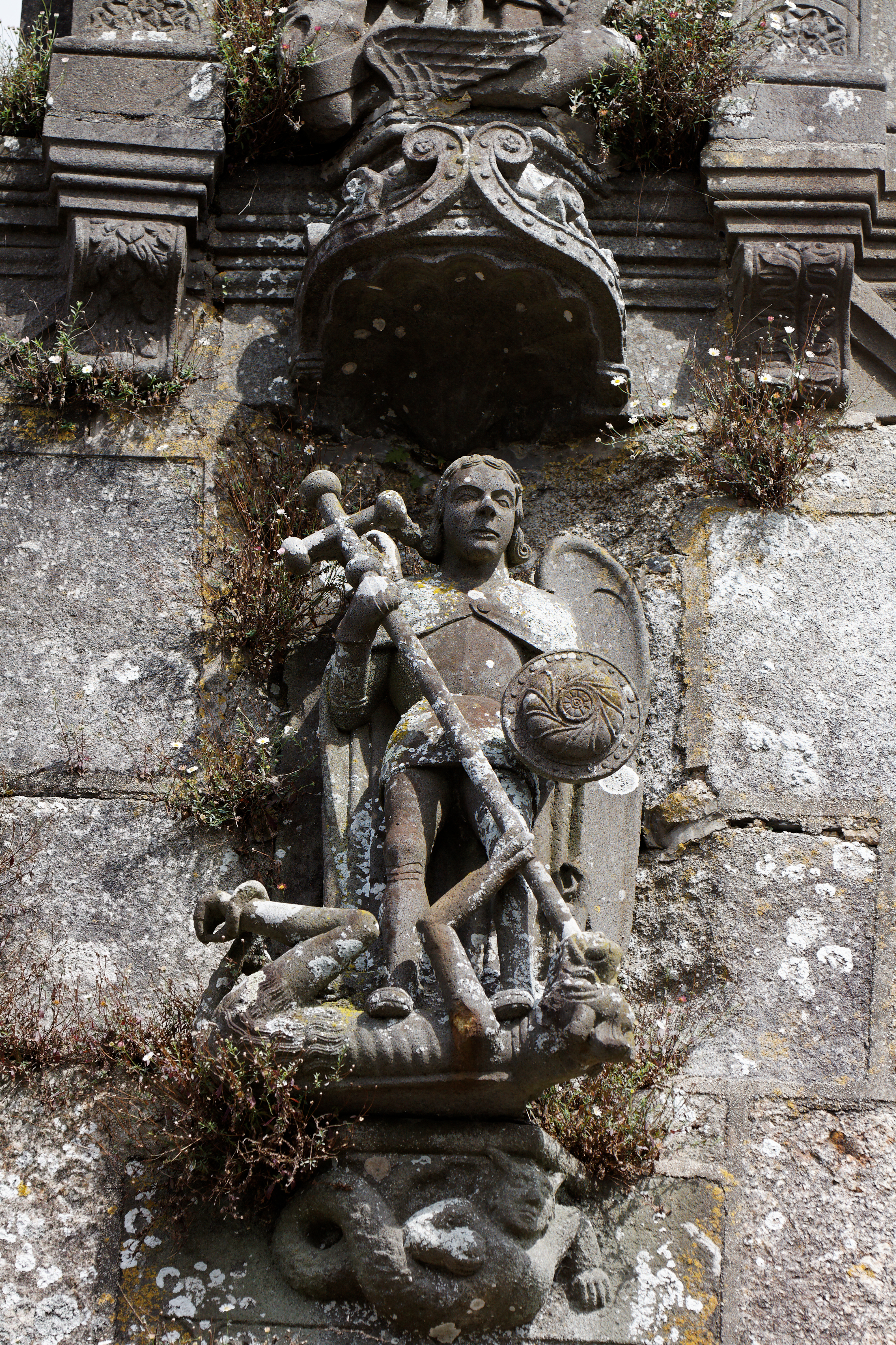 Une statue sur la façade de l'église. .